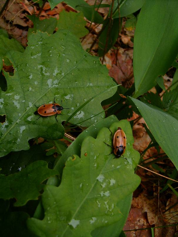 Česky: Přírodní park Baba